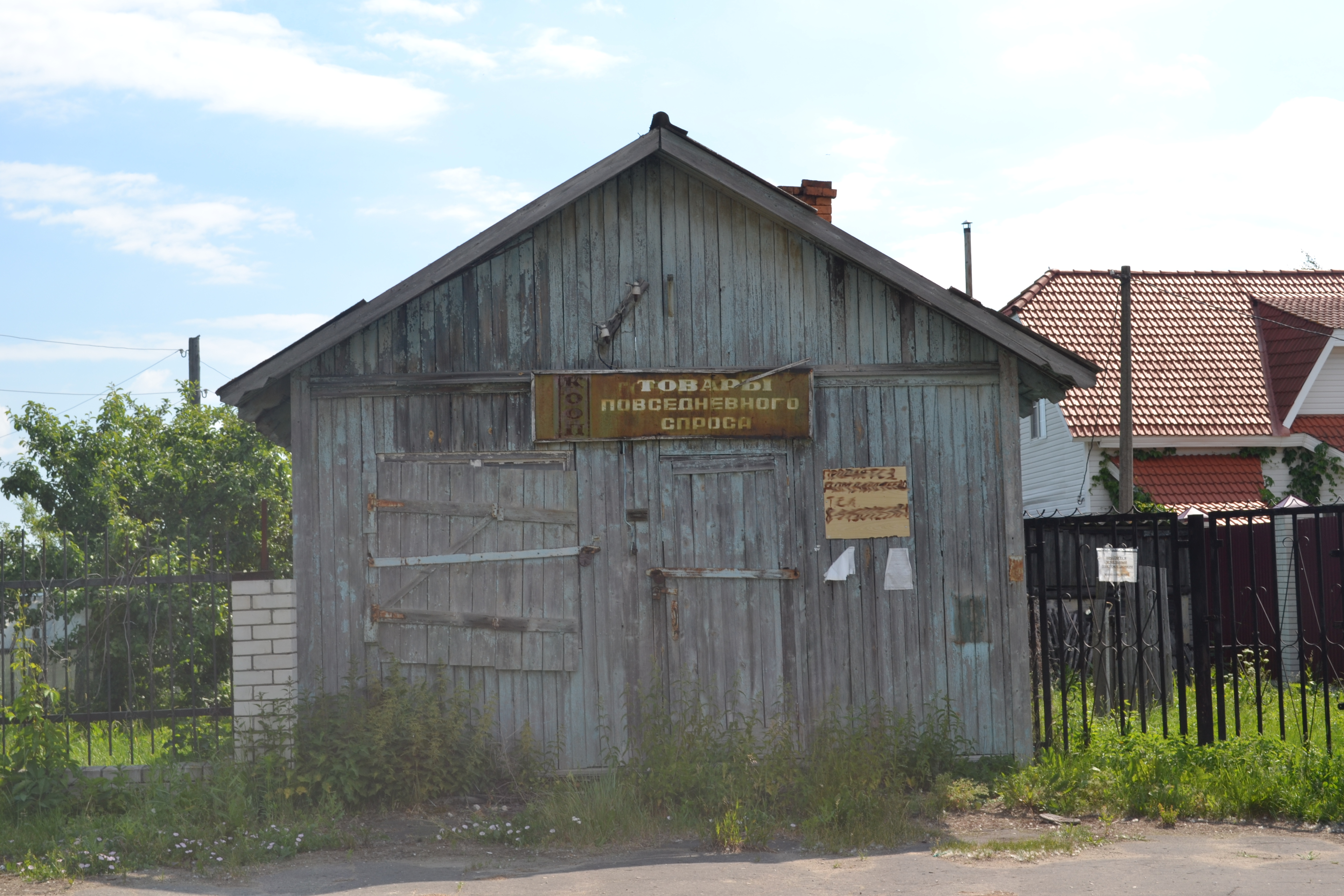 Дорофеево (Шатурский район)